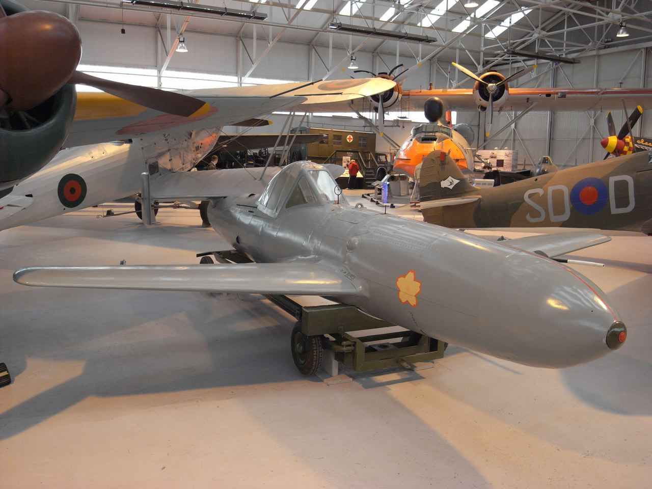 Oka in RAF Museum Cosford